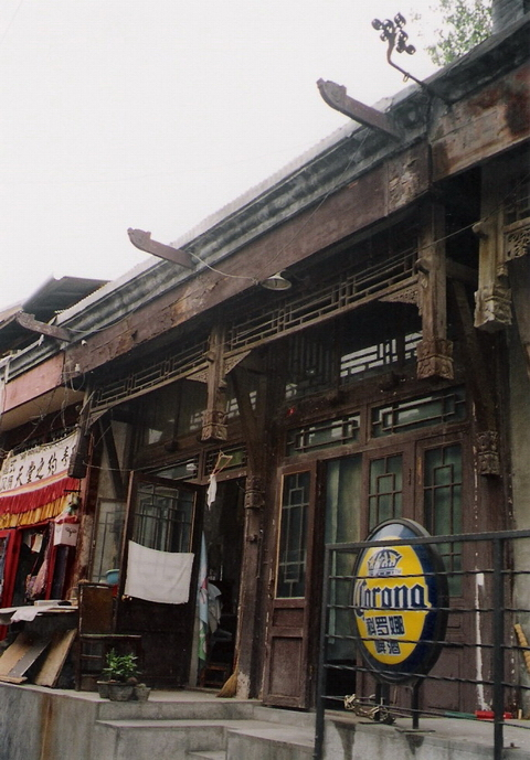 烟袋斜街老住家 smartneddy 2004年摄于什刹海